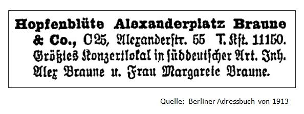 Adresse des von Alex Braune als Inhaber geführten Restaurants mit Unterhaltungsprogramm "Hopfenblüte"